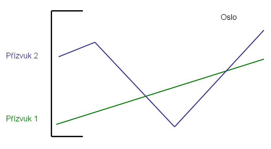 Přízvuk 1 a 2 u dvouslabičných slov v osloském nářečí norštiny